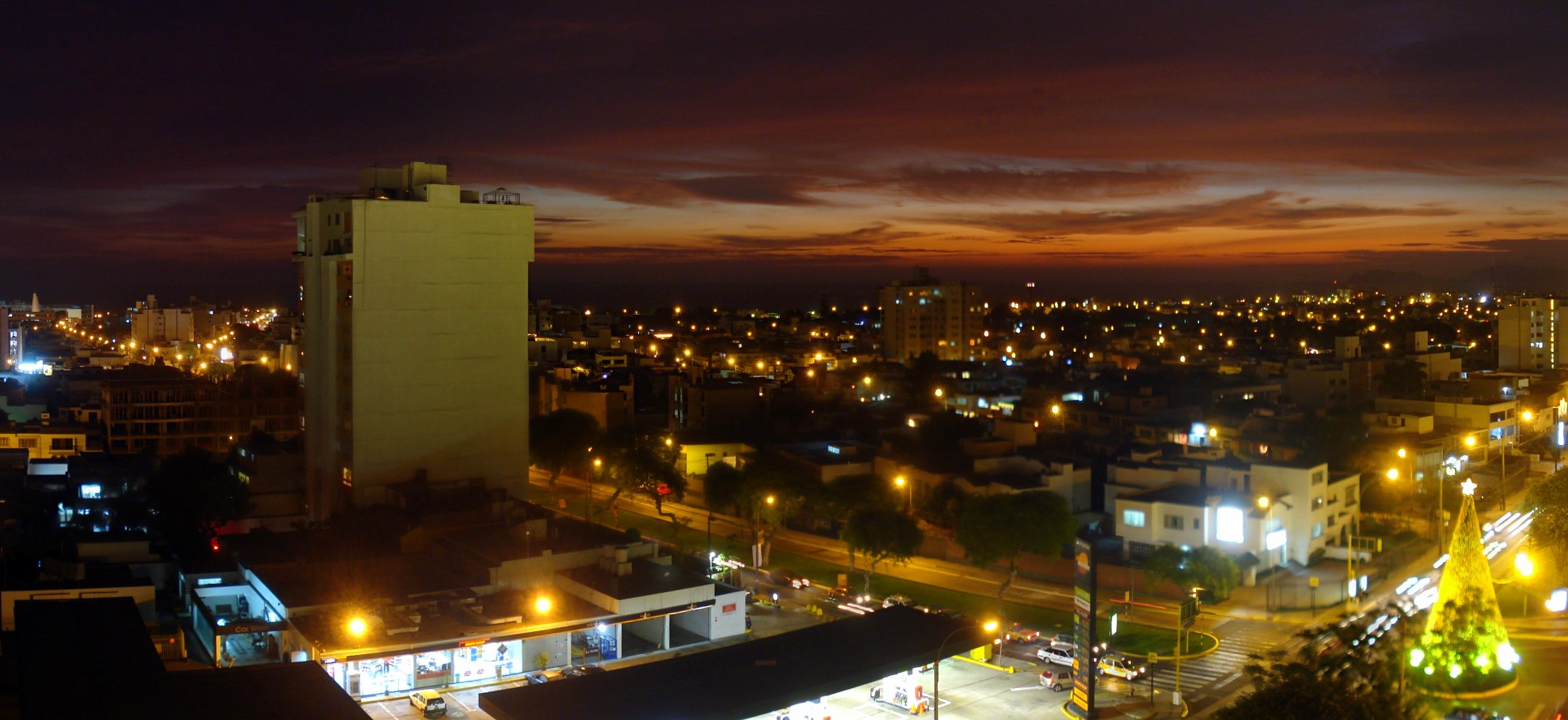 Distrito de Magdalena. Lima, Perú. Panorama compuesto por 4 fotos. Magdalena district. Lima, Peru. Panorama stitched from 4 photos.